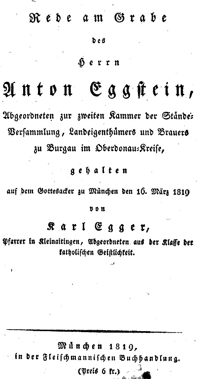 Anton Eggstein (1780-1819), Bayerischer Landtagsabgeordneter, Titelblatt zur Trauerrede 1819